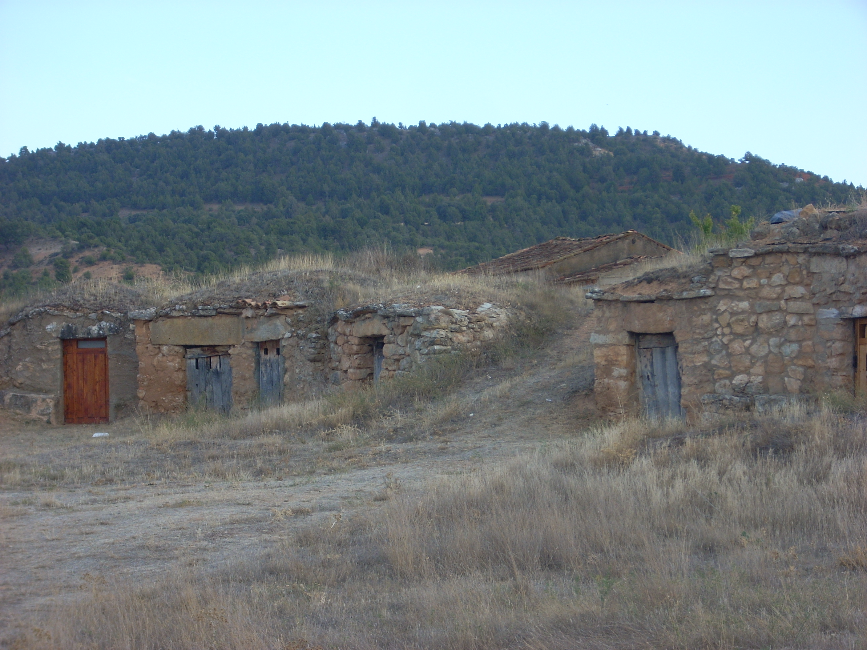 Bodegas de Morales con la Muela de fondo